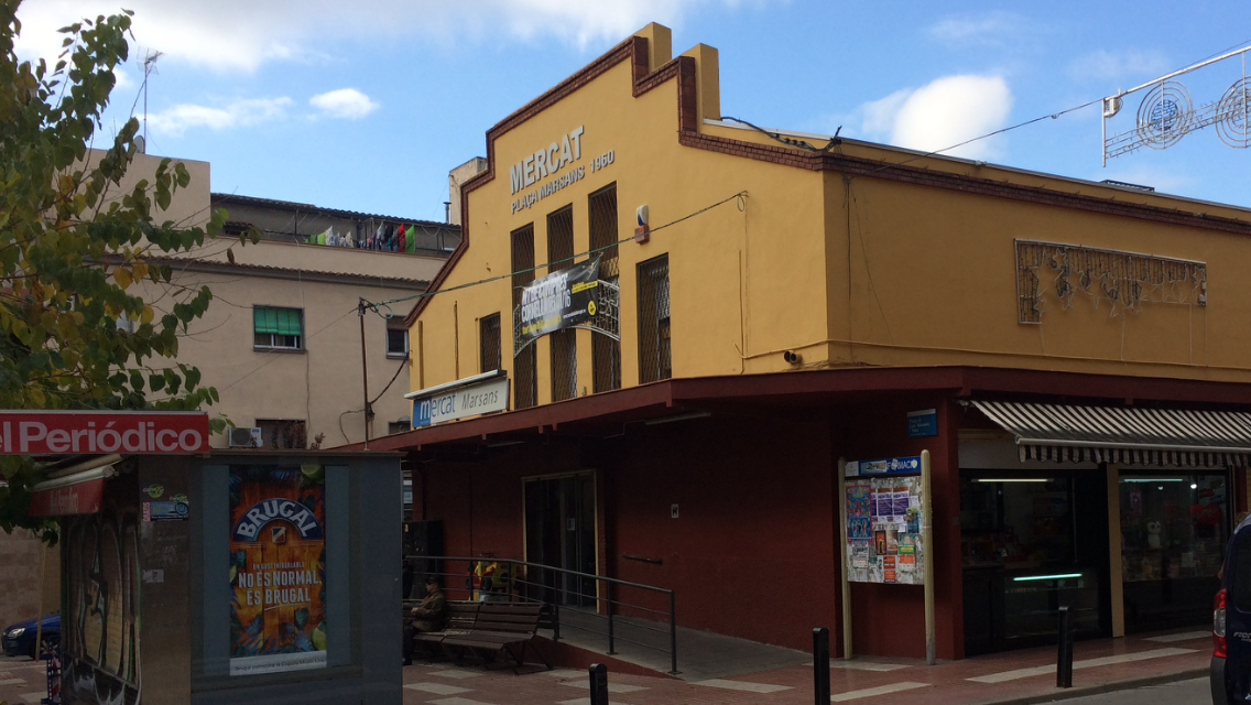 Façana principal del Mercat Marsans de Cornellà de Llobregat.